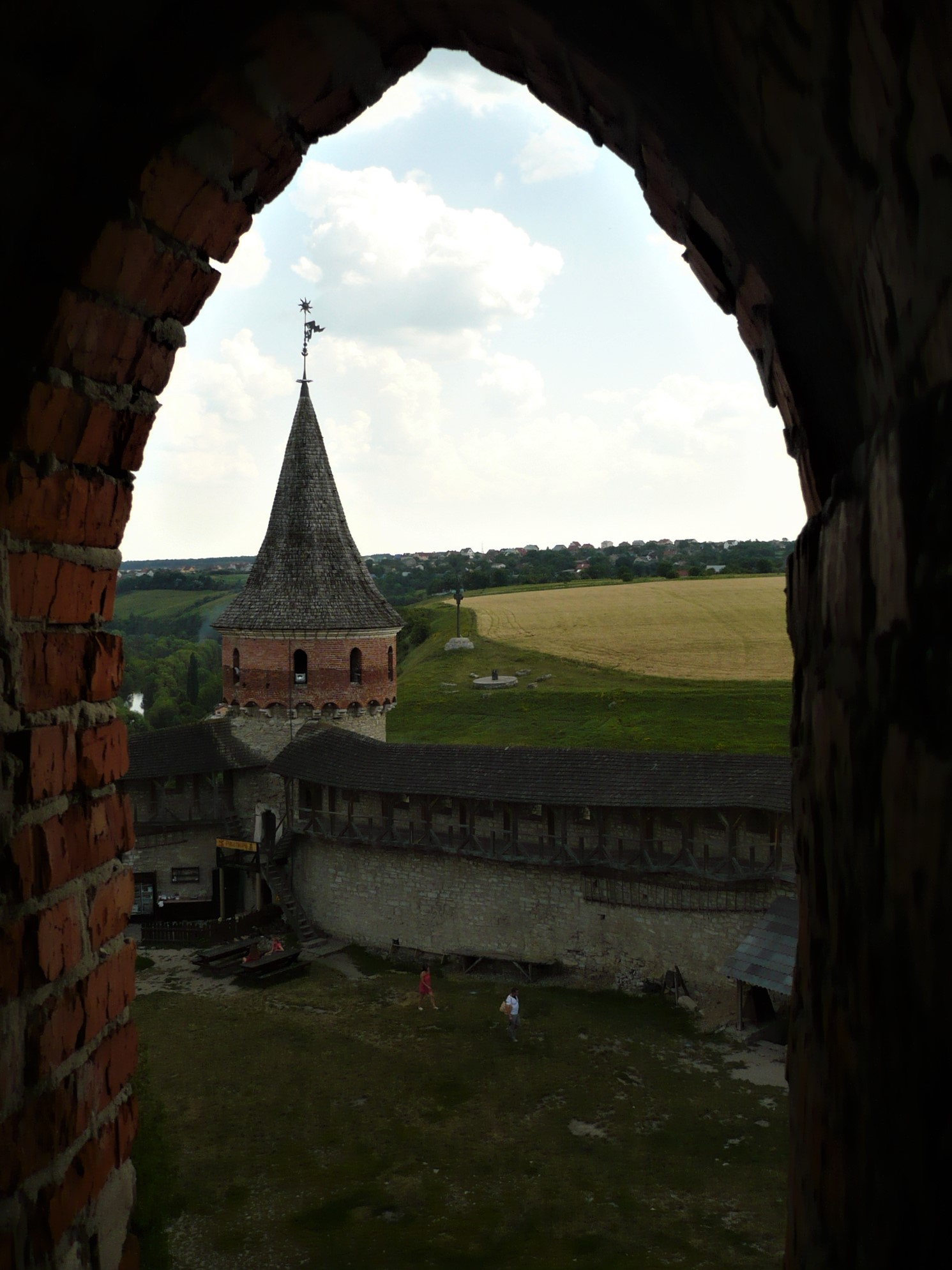 Twierdza w Kamiencu Podolskim. Widok na basztę